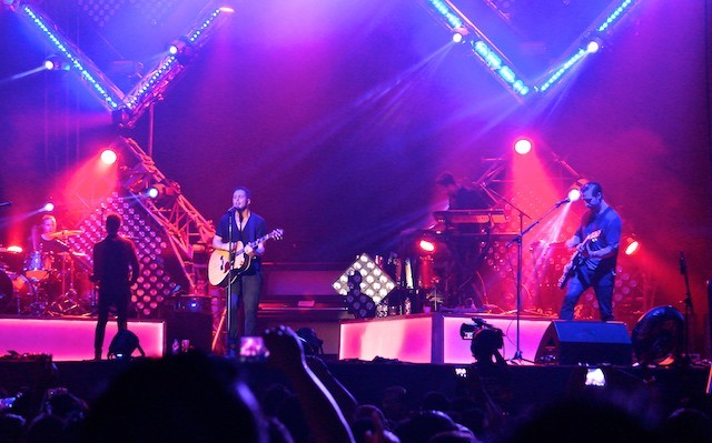 OneRepublic en vivo en Surf Beach, Sunway, 2013.